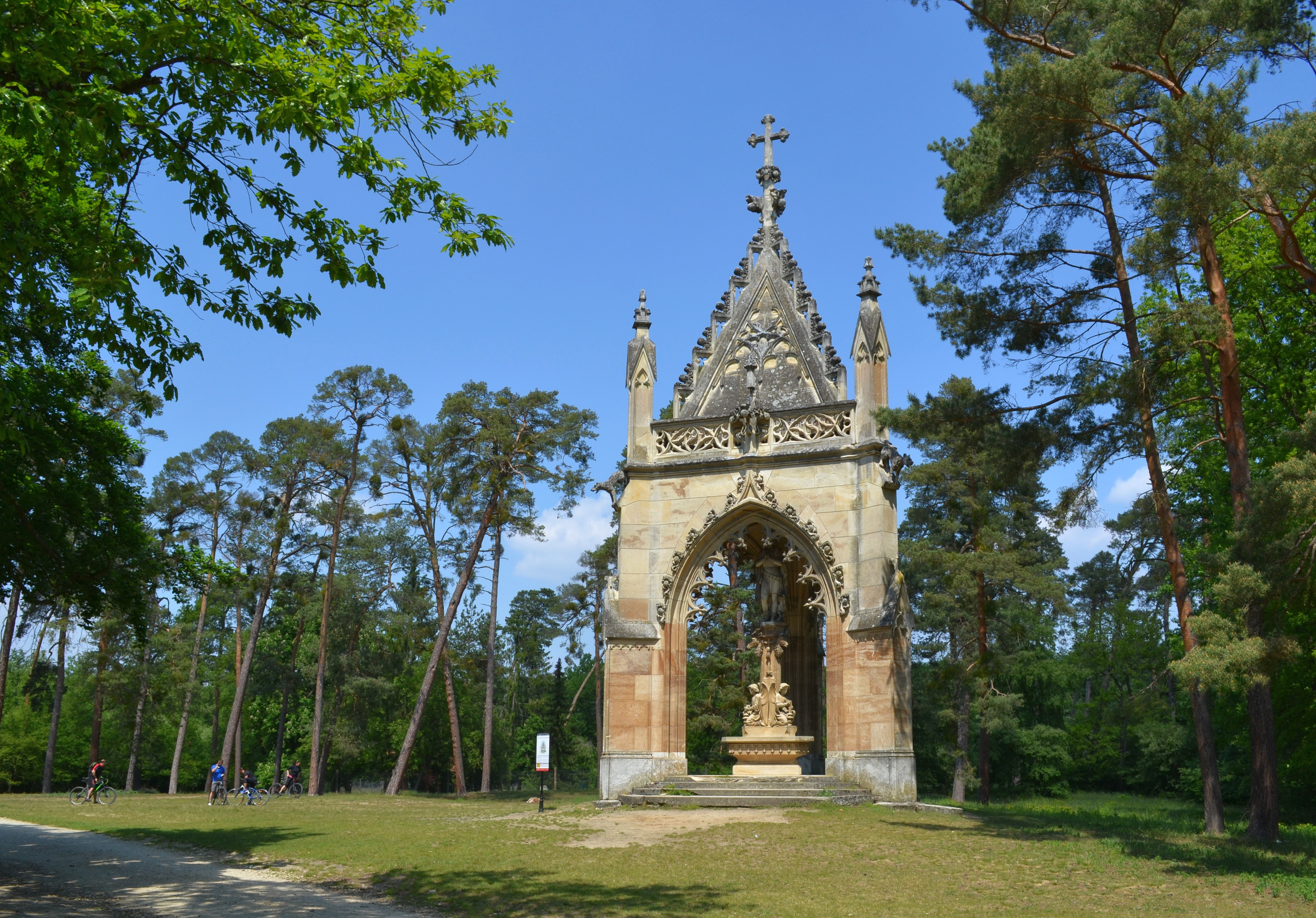 Lednicko-valtický areál - kaple sv. Huberta